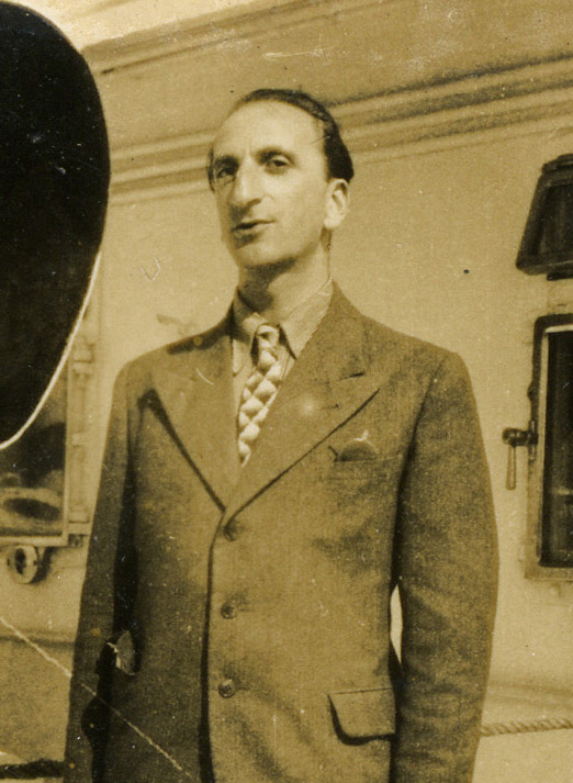 רודולף יונס, שנות ה-40